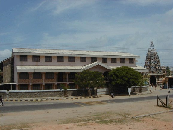 தி/இ.கி.ச.ஸ்ரீ கோணேஸ்வரா இந்துக் கல்லூரி